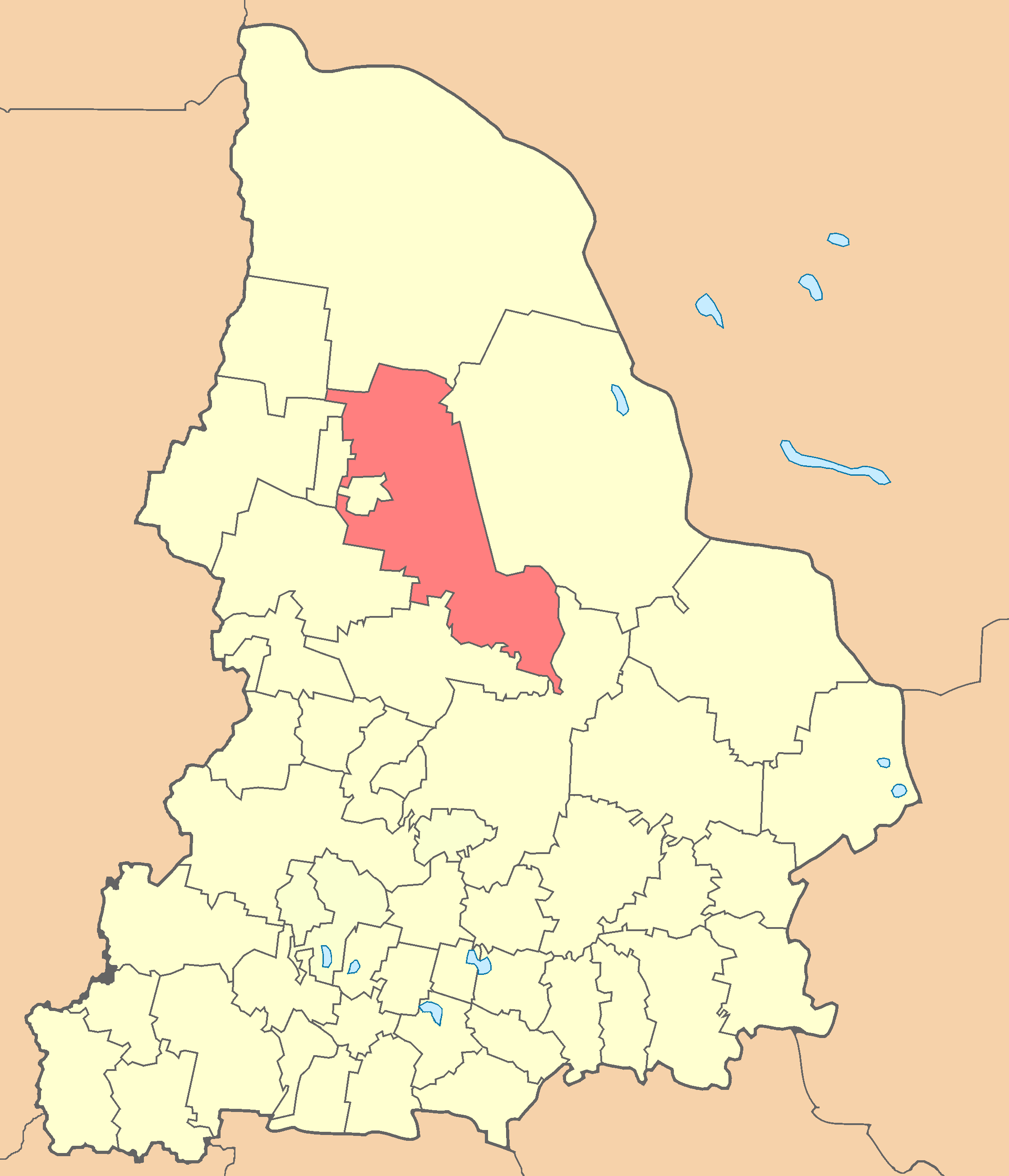 Серовский район на карте АТД Свердловской области 1991 года